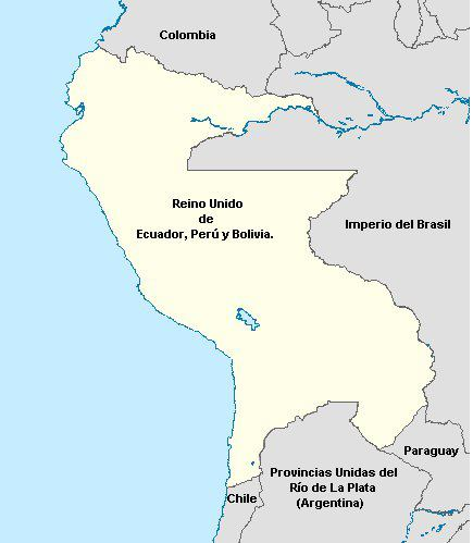 Mapa Reino Unido de Ecuador, Perú y Bolivia. (1844) Fue uno de los tantos intentos monarquicos producidos en Ecuador a mediados del siglo XVII. Este movimiento monárquico tuvo como propuesta unificar los territorios Ecuador, Perú y Bolivia en un solo país,con un sistema monárquico bajo la dirección de Agustín Muñoz y de Borbón.